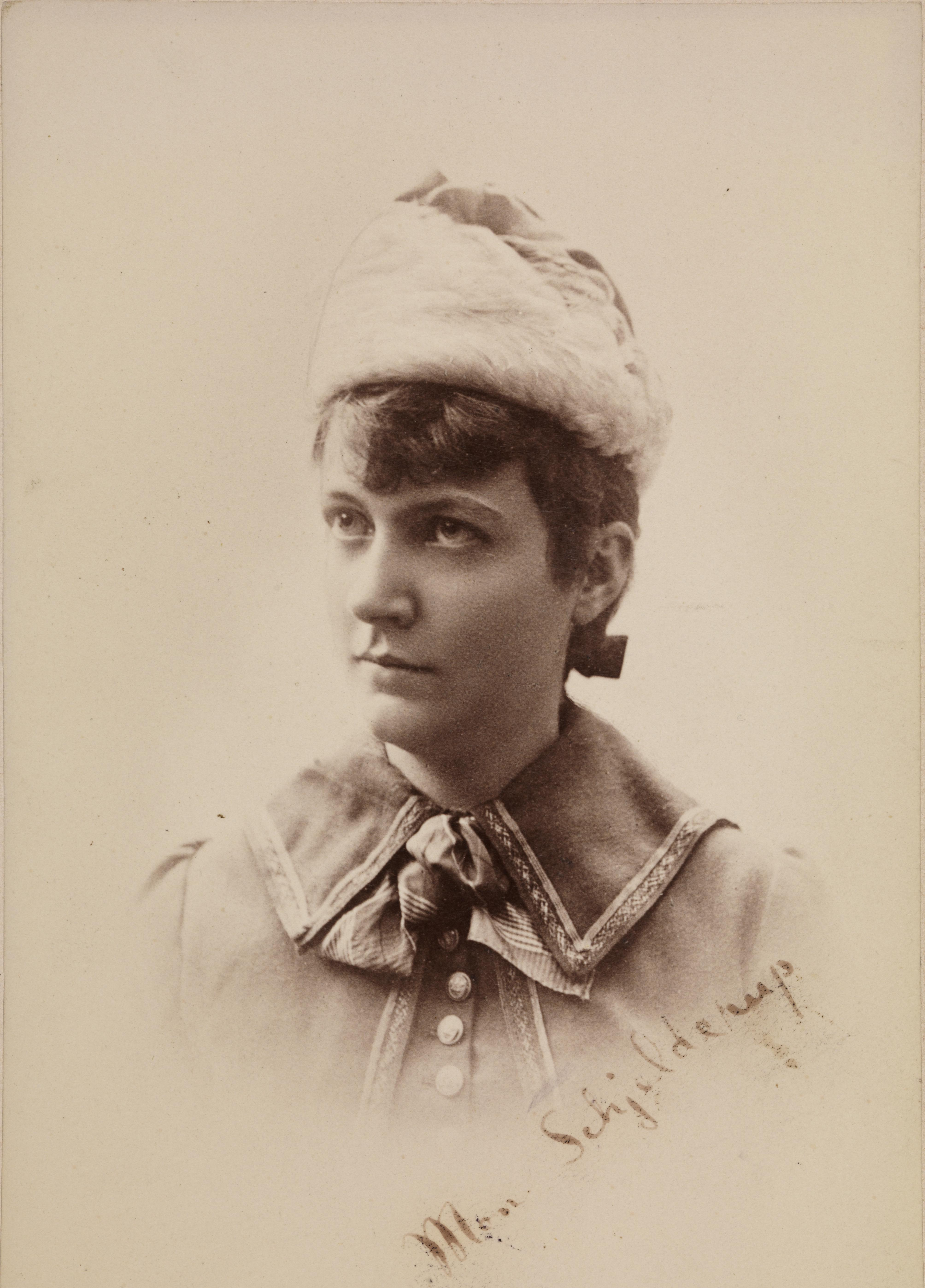 Bildet er hentet fra Nasjonalbibliotekets bildesamling Depicted person: Schjelderup, Mon